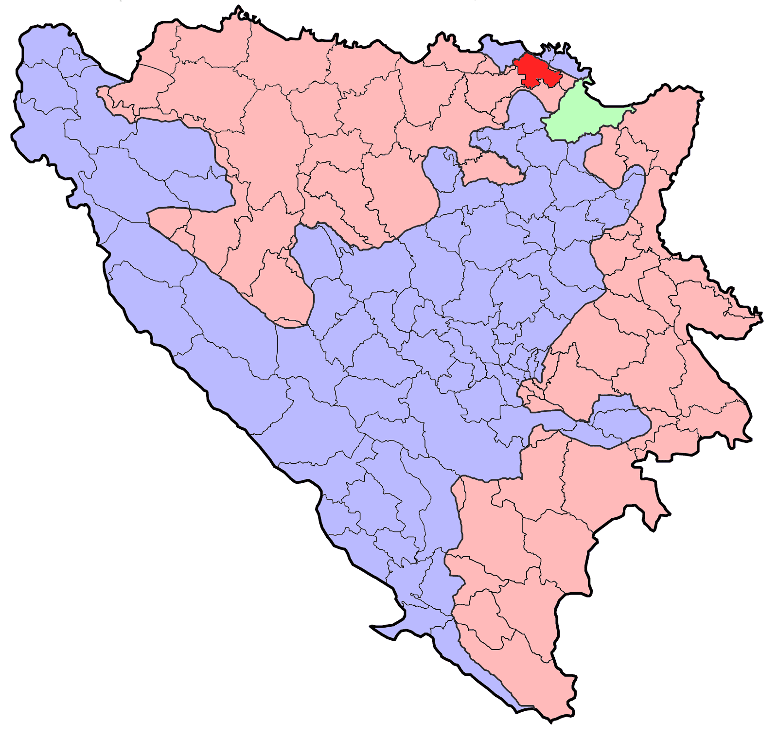 Republika Srpska (BiH) municipality